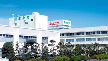 日本分光本社